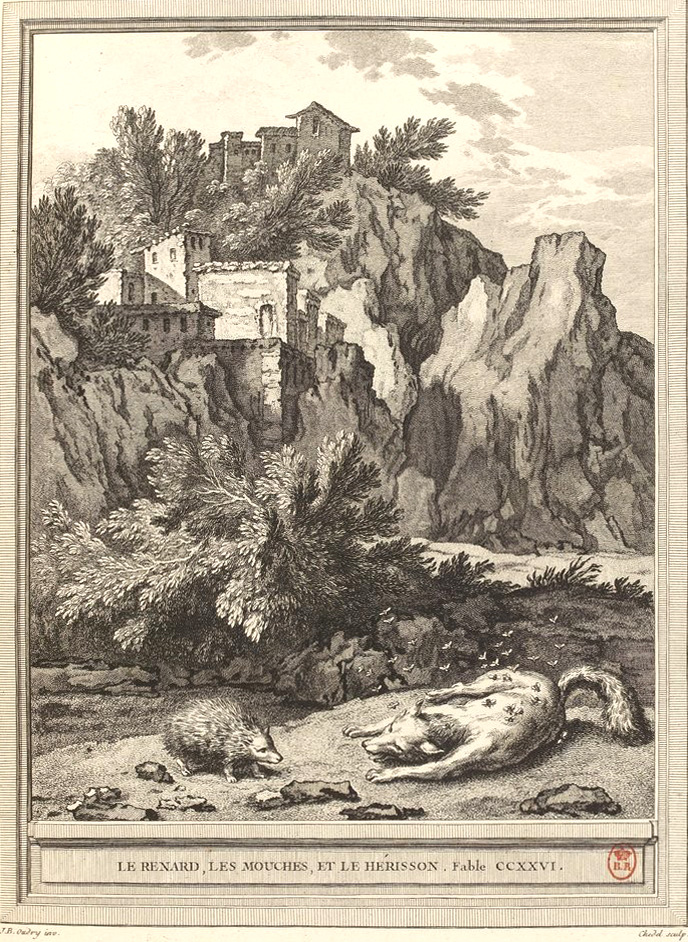 Gravure réalisée par Pierre Quentin Chedel d'après un dessin de Jean-Baptiste Oudry représentant la fable Le renard, les mouches et le hérisson de Jean de La Fontaine (fable 13 du livre XII). Cette gravure est parue dans l'édition complète des fables de La Fontaine, parue en quatre tomes chez l'éditeur Desaint & Saillant, rue saint Jean de Beauvais à Paris, 1755-1759.